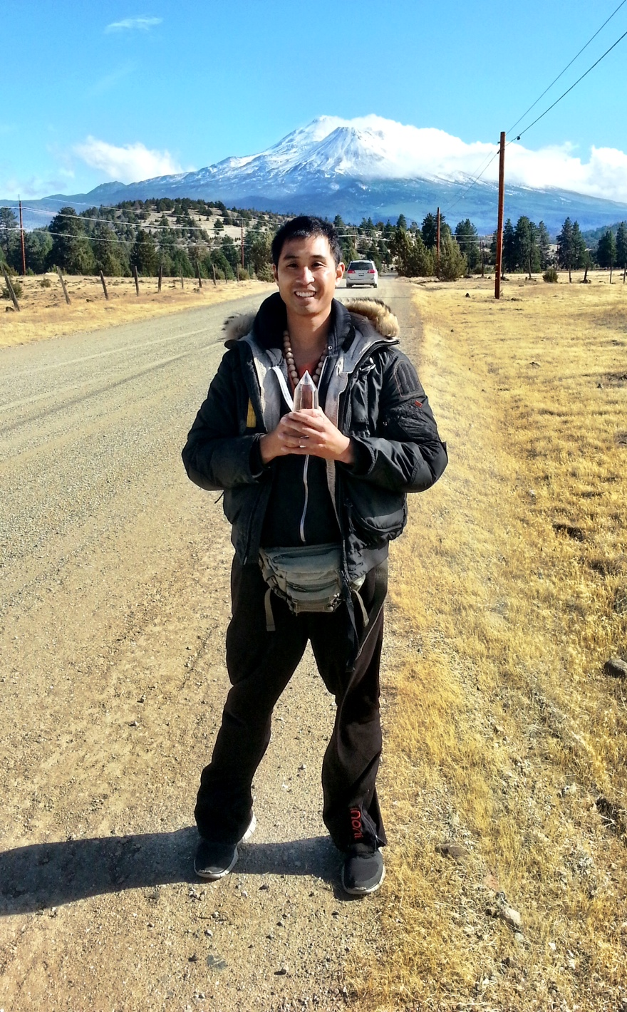 Joe Eigo at the Mount Shasta Vortex